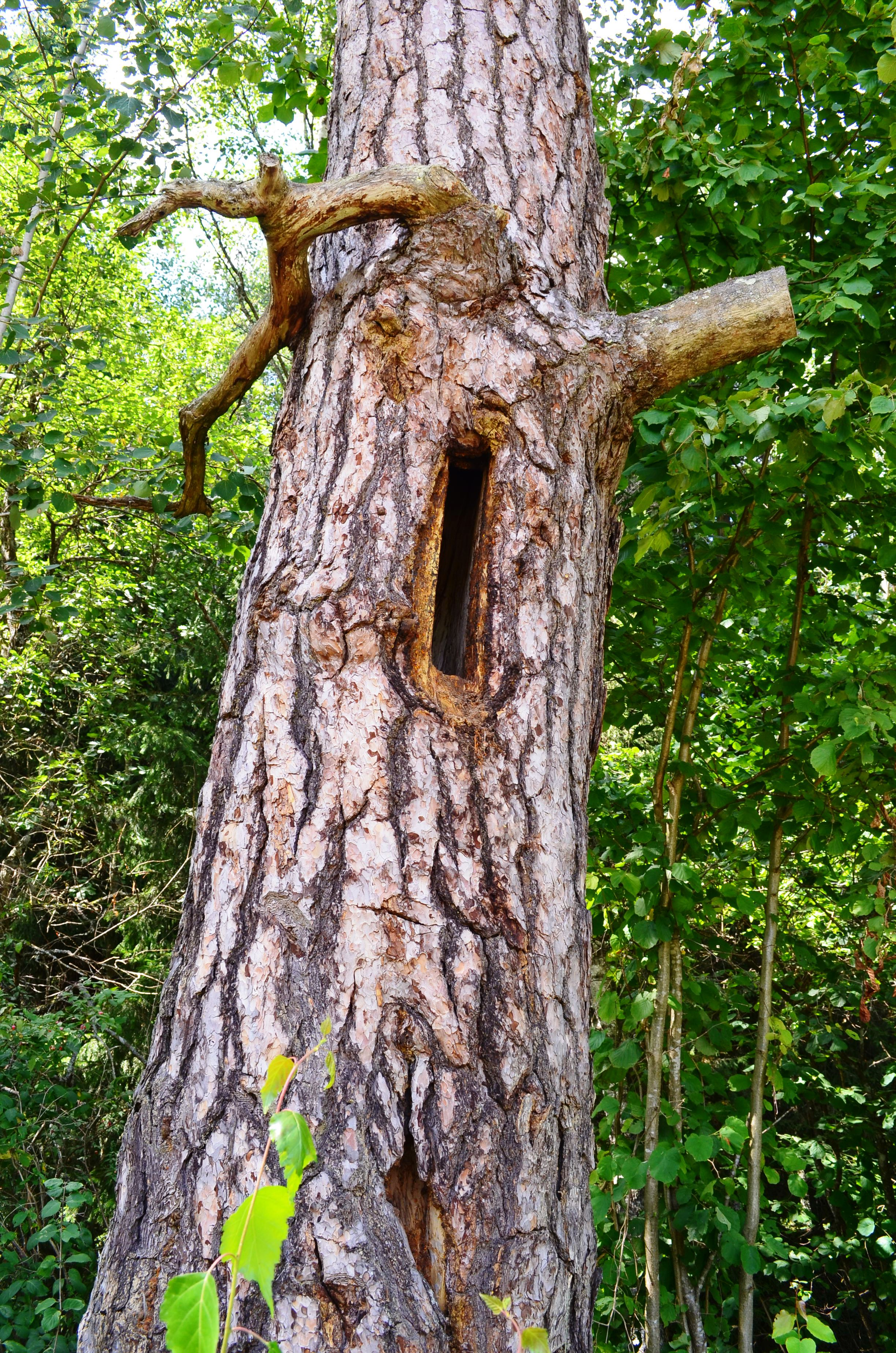 Drevėta pušis. Zervynos, Dzūkijos NP, Varėnos raj.